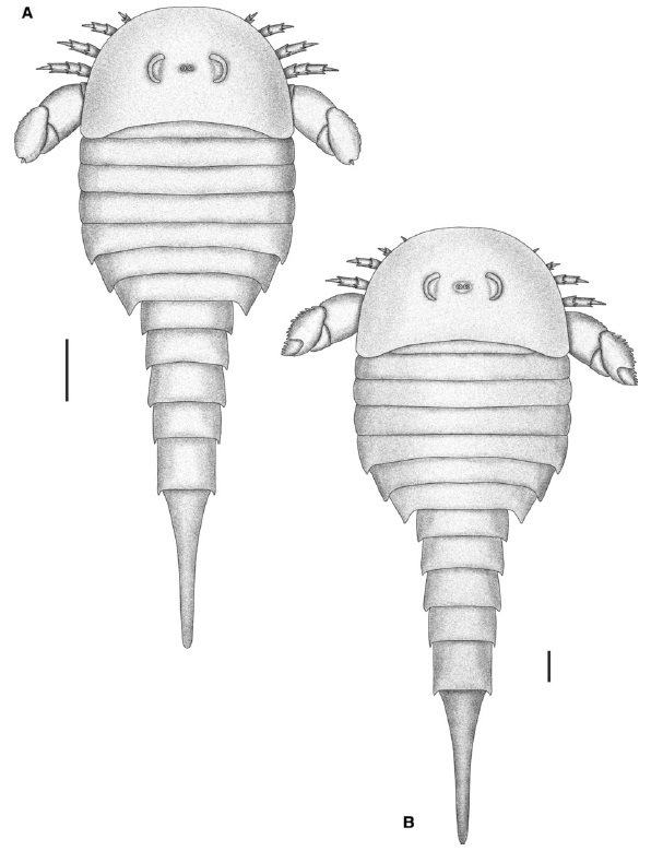 Strobilopterus proteus subadult and adult instars. Reconstructions of subadult and adult instars. A: Juvenile/subadult instar γ. Limbs and posterior opisthosomal segments are extrapolated from a juvenile individual of Strobilopterus princetonii. The telson is extrapolated from FMNH PE 61166. B: Subadult/adult instar δ. Anterior prosomal limbs are extrapolated from Strobilopterus princetonii. The telson is extrapolated from FMNH PE 61166. Scale bars = 10 mm.